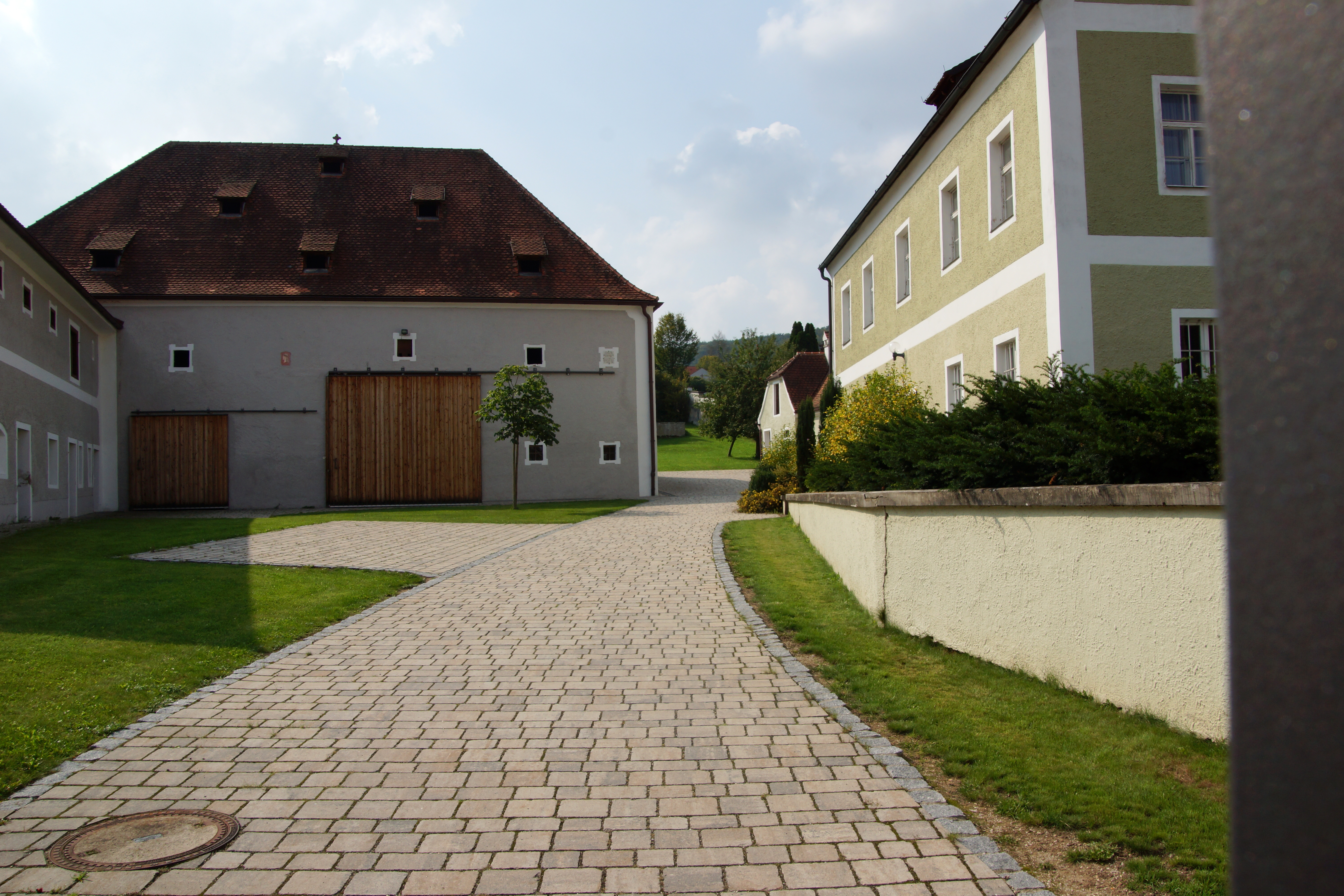 Duggendorf an der Naab